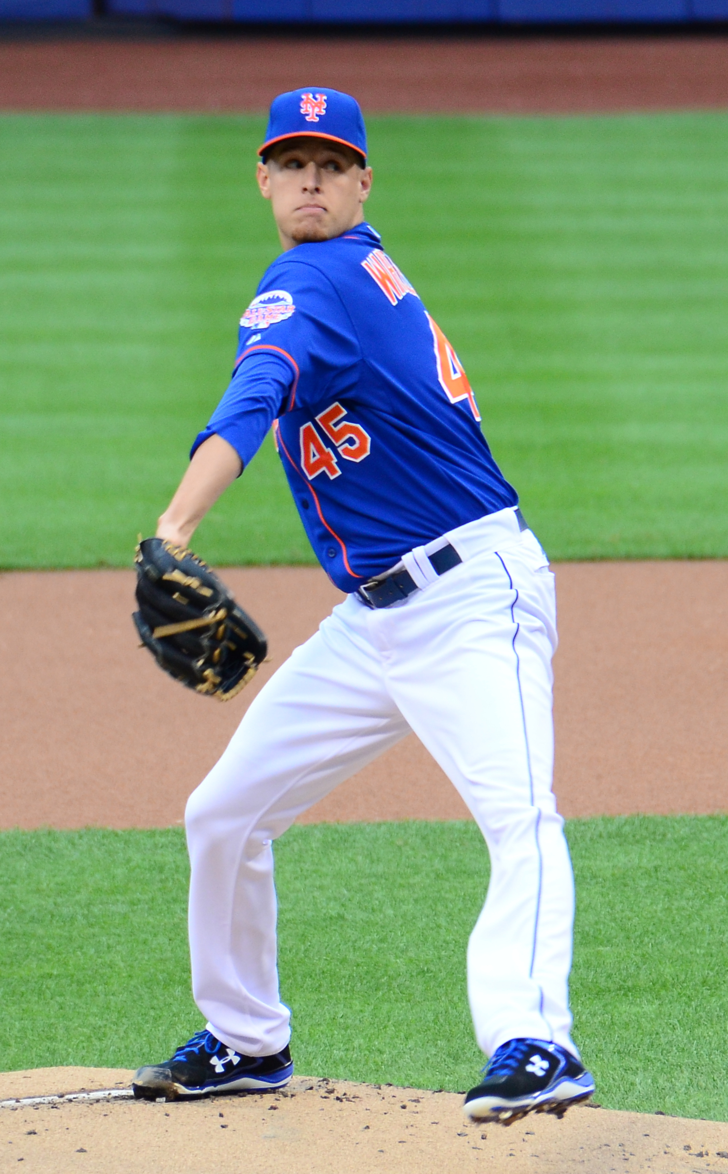 Zack Wheeler